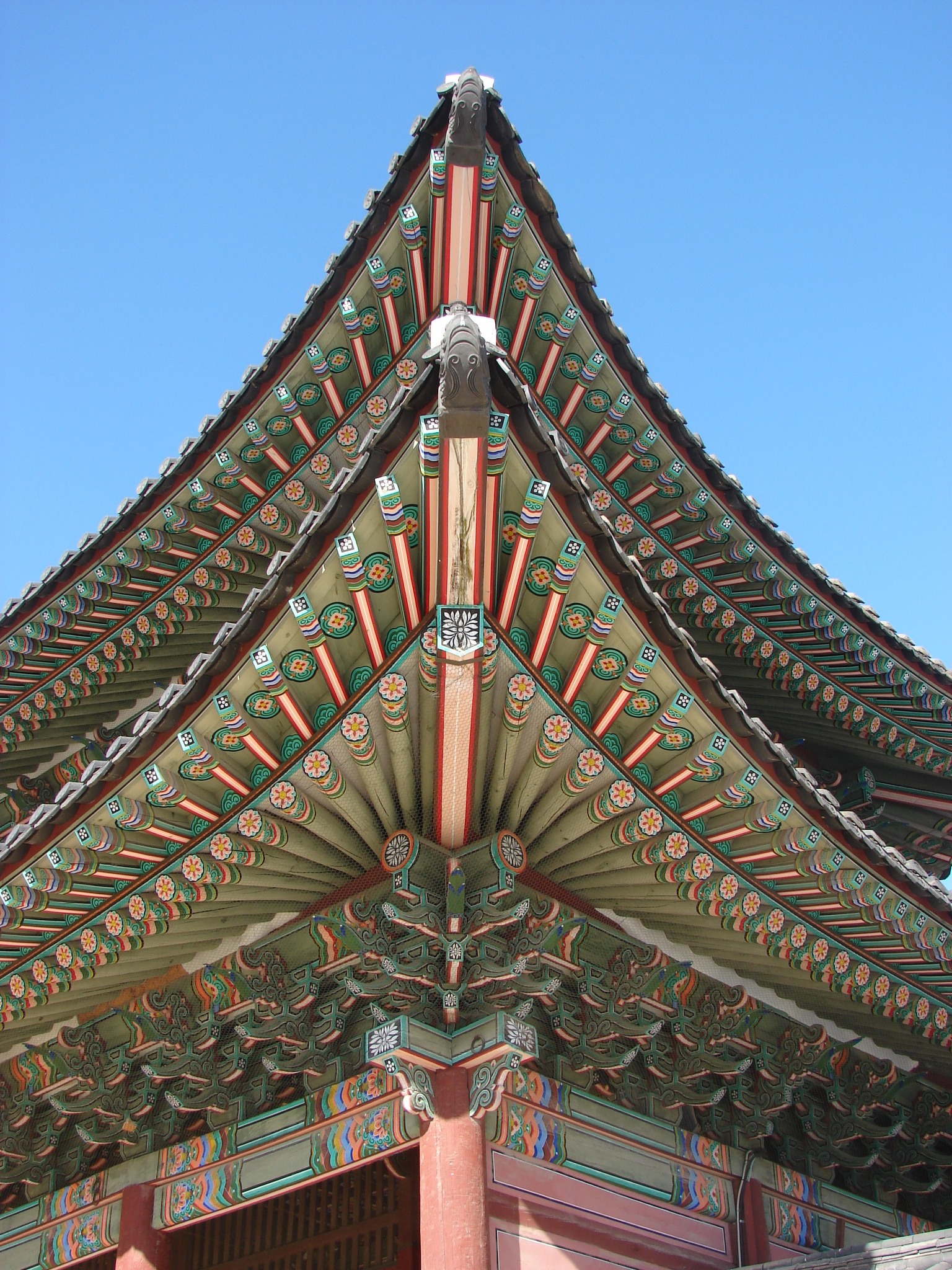 Séoul, Corée (Korea), 30 janvier 2011